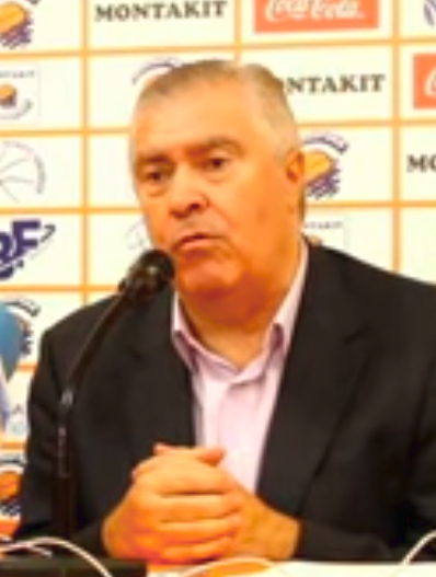 Declaraciones de José Quintana, presidente del Montakit Fuenlabrada y José Ramón Cuspinera, nuevo técnico del club, en su presentación oficial.